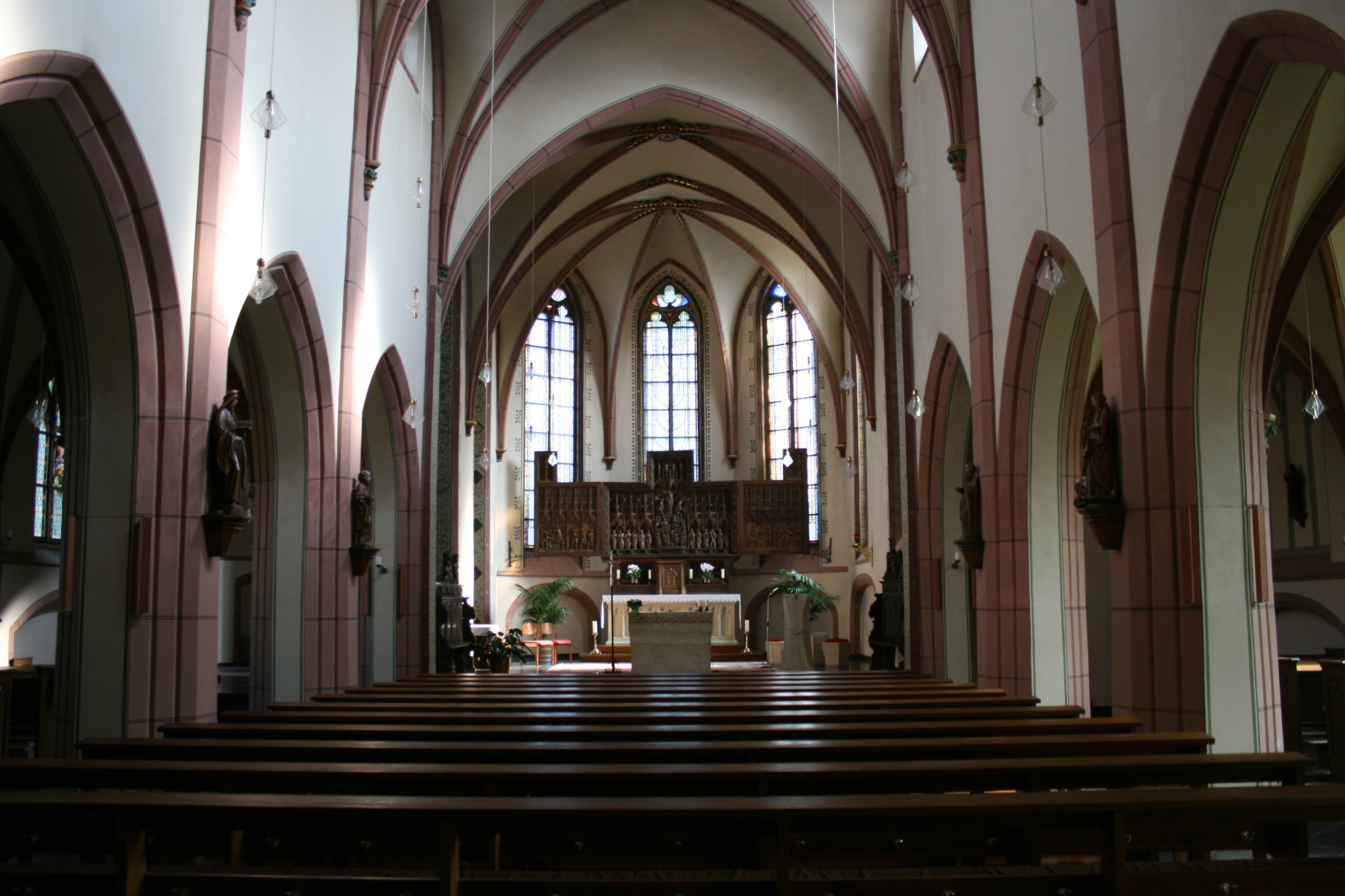 Sankt Peter und Paul in Kalkar-Grieth